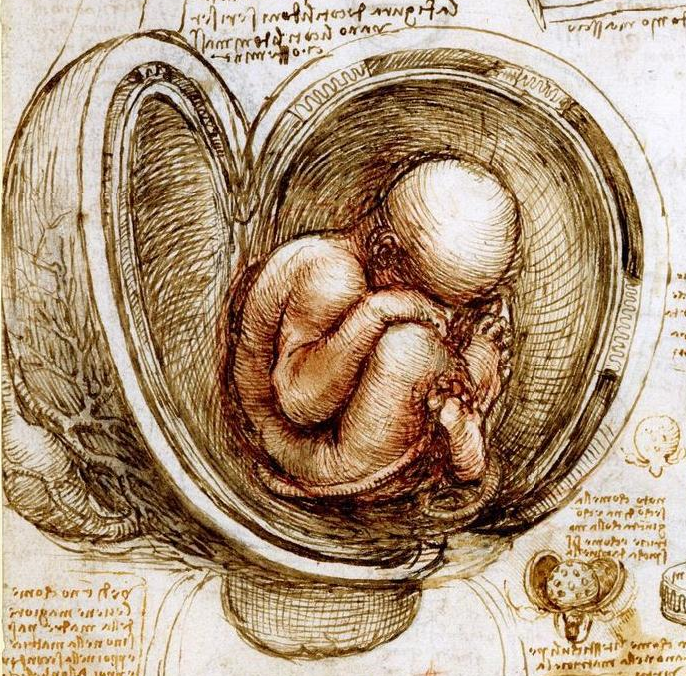 Bambino nel grembo materno disegnato da Leonardo da Vinci (1511 circa), dettaglio dal codice Windsor sugli studi sugli embrioni.